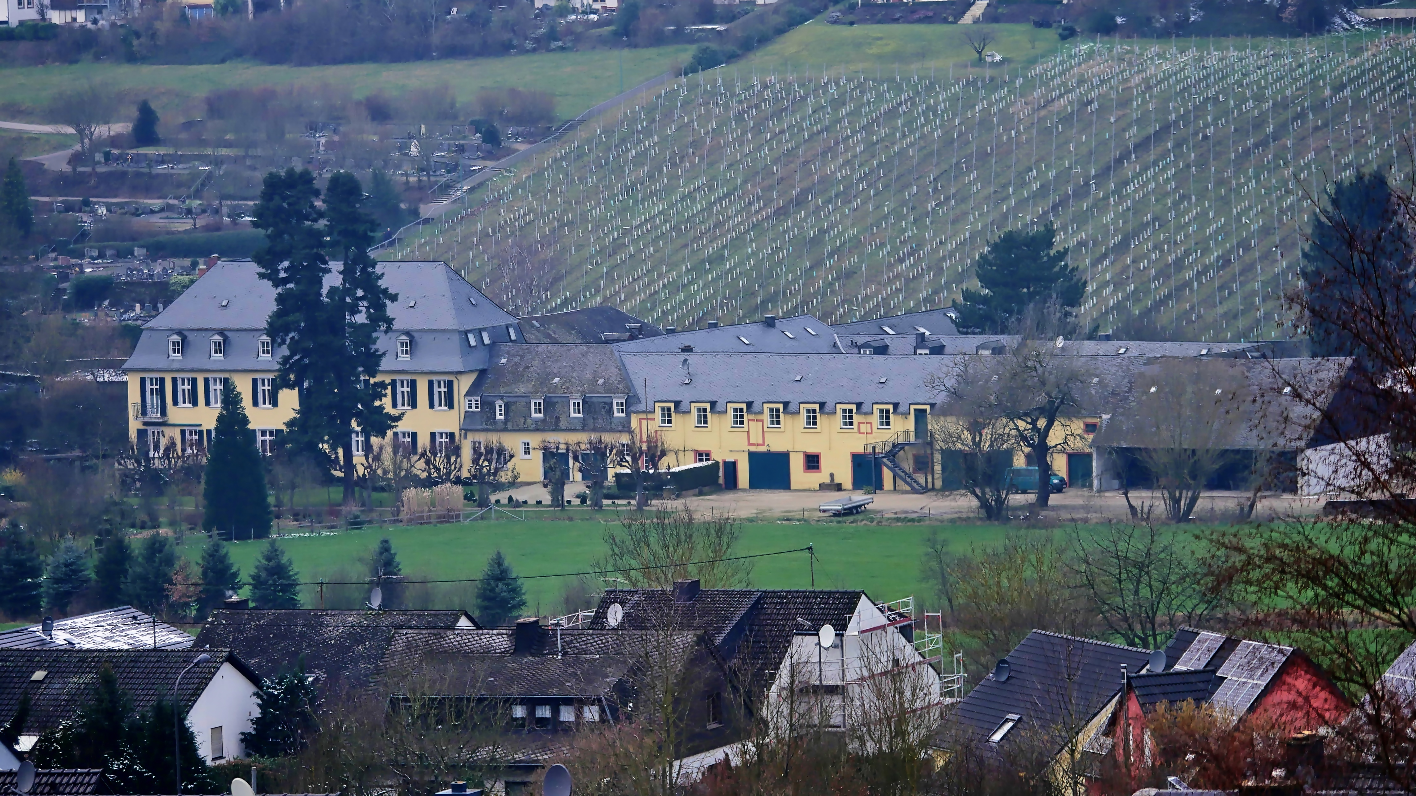 Maximinerhofgut, heute Weingut von Hövel, sogenannte Burg; barocke Zweiflügelanlage (Nr. 5 bezeichnet 1732), vierkantiger Wirtschaftshof (Nr. 4, 18. und 19. Jahrhundert) und Putzbau (Nr. 6 um 1900)